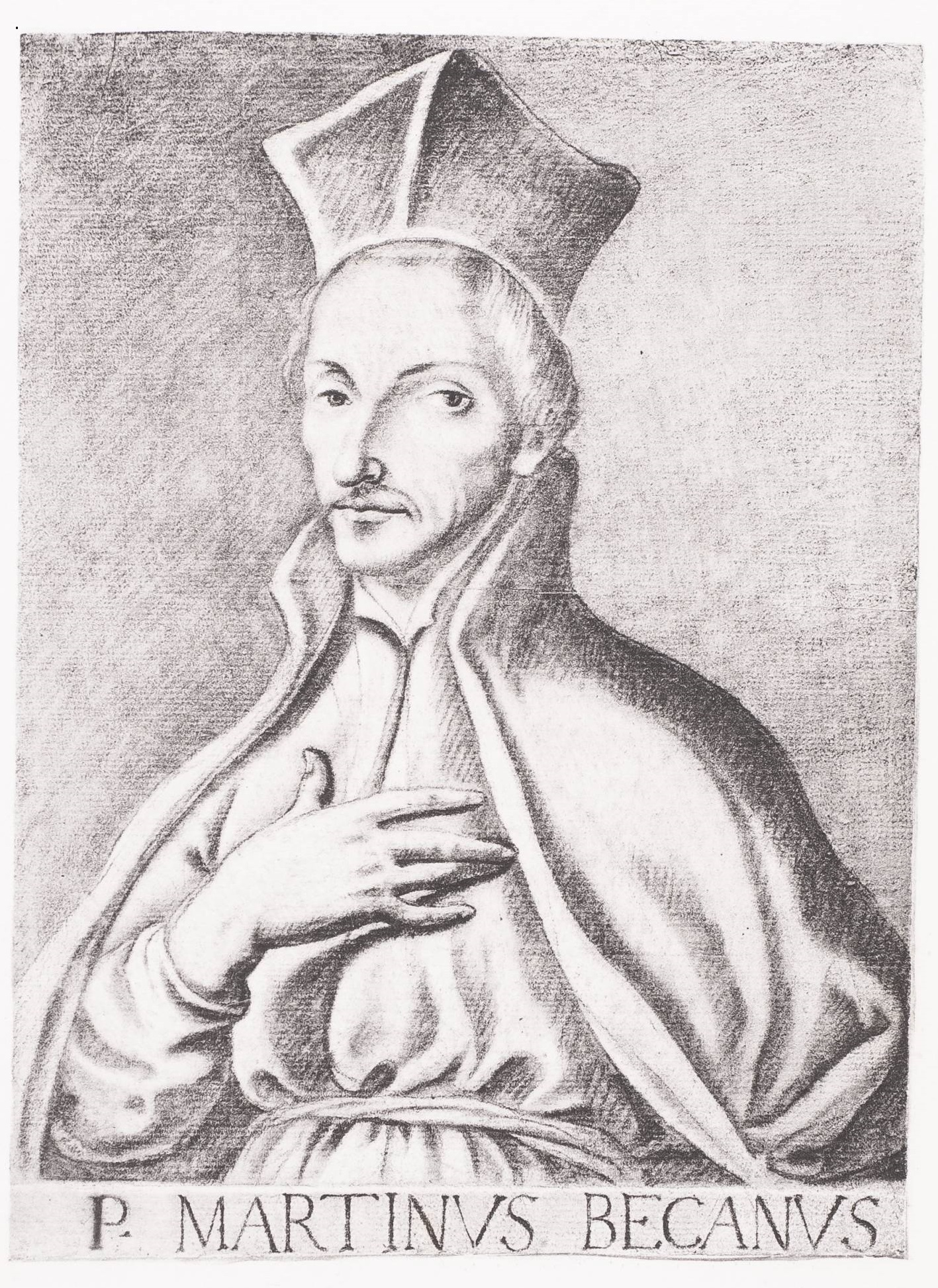 Мартин Бекан